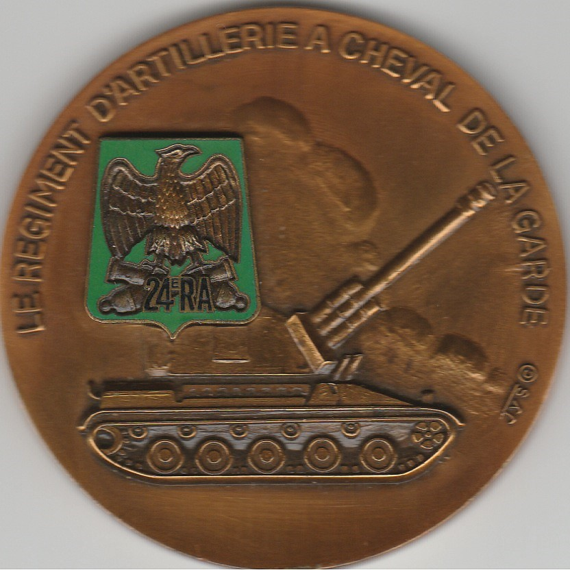 Médaillon du 24° régiment d'artillerie avec son insigne, sa devise et la représentation d'un canon AMX Au F1. Objet personnel reçu au 24° RA à la fin de mon service.